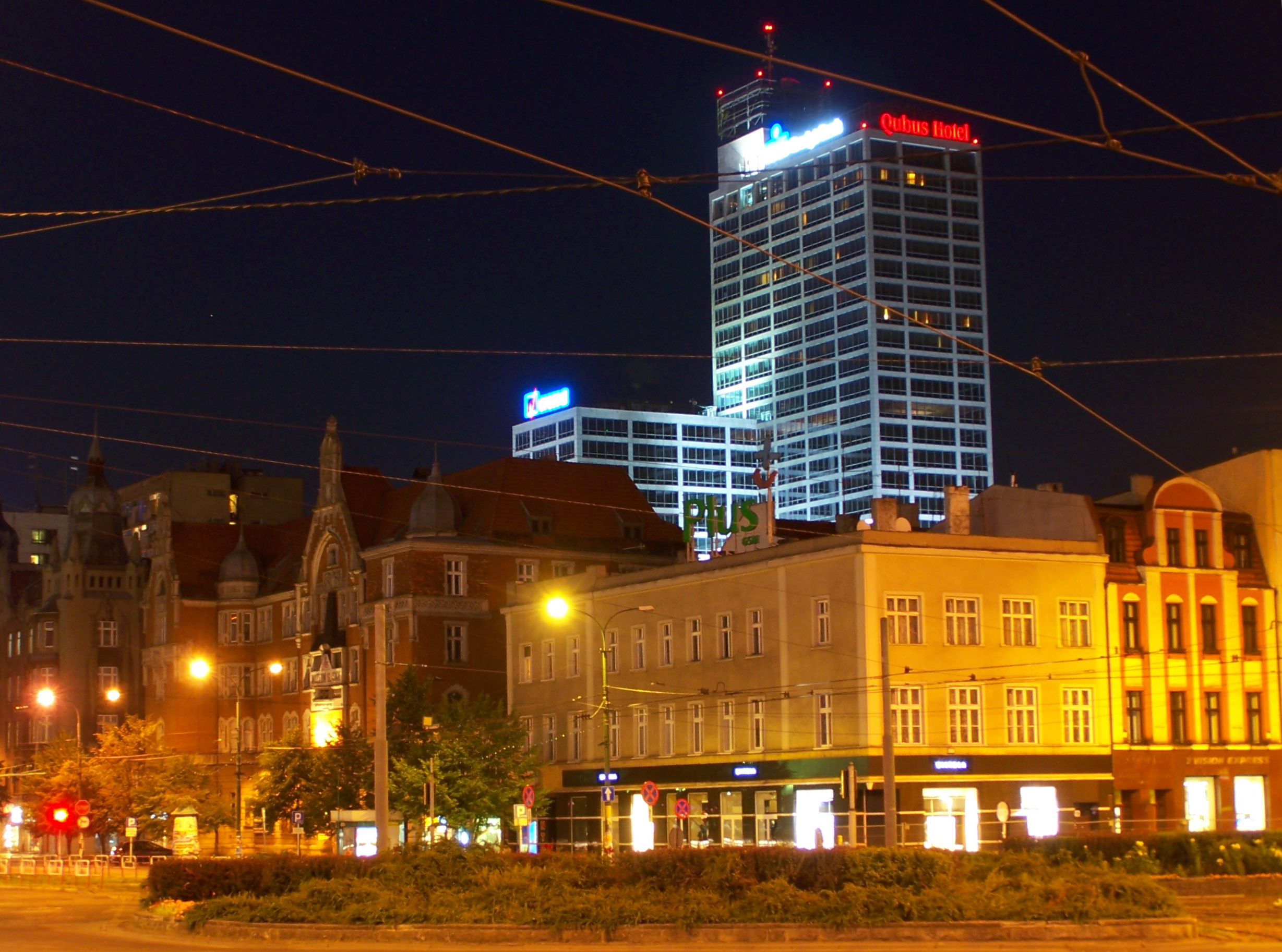 Nocne zdjęcie Rynku i fragmentu Alei W. Korfantego w Katowicach. W tle wieżowiec "Altus".